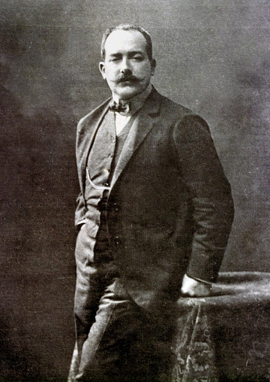 Guillermo Billinghurst Angulo (1851-1915). Presidente del Perú de 1912 a 1914.